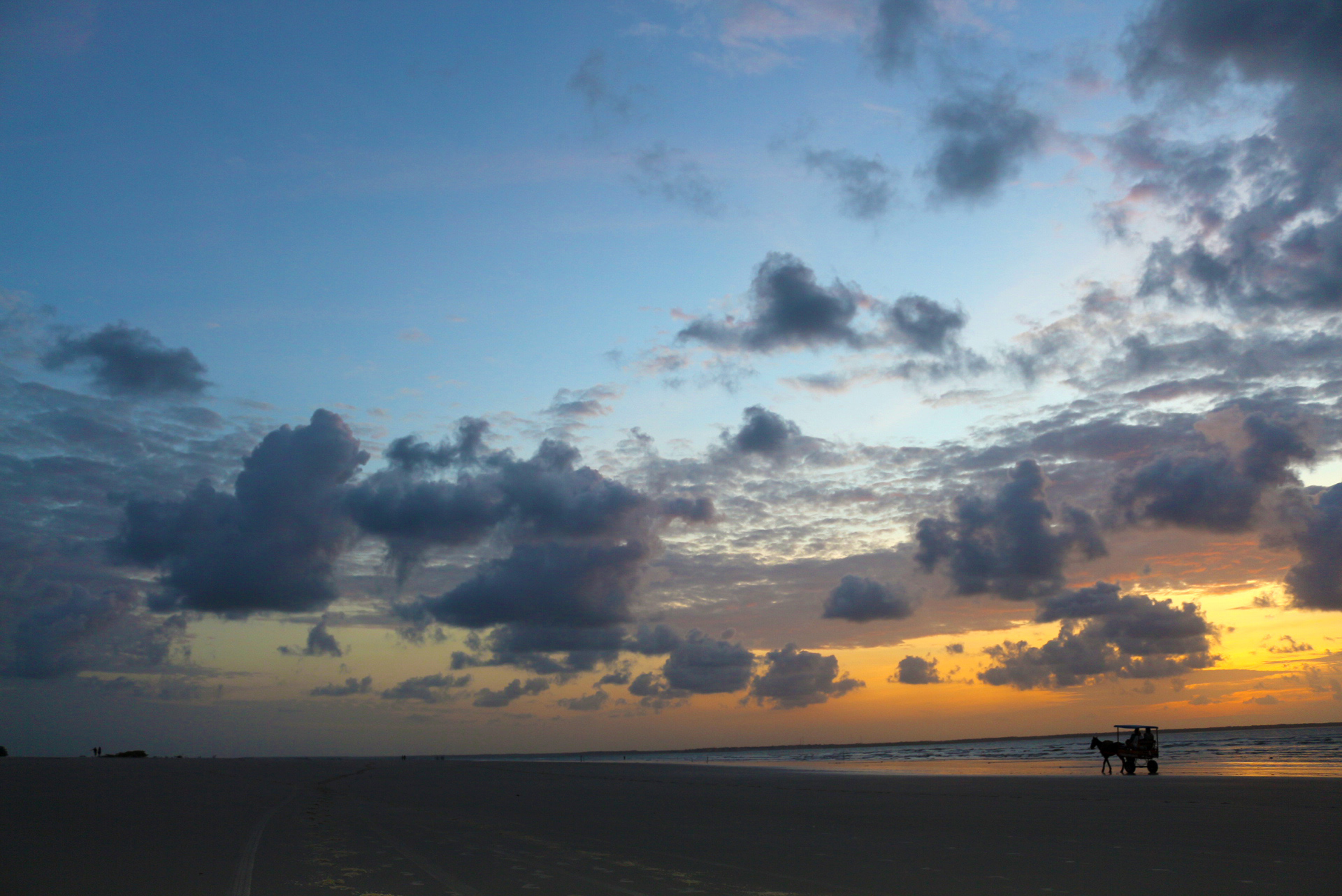 A Ilha de Algodoal Maiandeua é uma Área de Proteção Ambiental (APA), localizada no litoral nordeste do estado do Pará, no município de Maracanã, entre as coordenadas geográficas de 00° 35’ 03 a 00° 38’ 29 S e 47° 31’ 54 a 47° 34’ 57 W. A ilha é formada por quatro comunidades pesqueiras: Algodoal, Camboinha, Fortalezinha e Mocooca. Possui uma área de 2.378ha. Sua cobertura vegetal é constituída, predominantemente, por manguezais, apicuns, restingas e vegetação secundária. (Fonte: Museu Paraense Emilio Goeldi) Foto: Fabrício Coleny